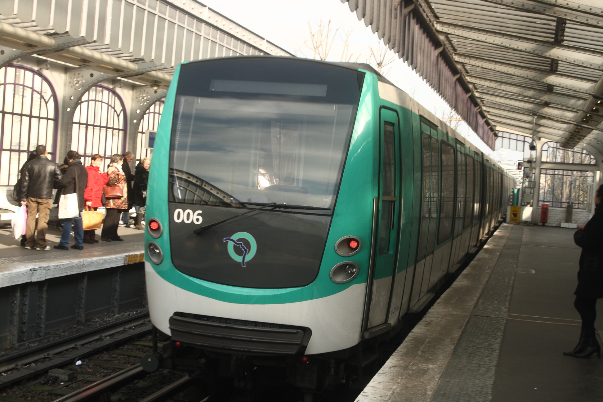 MF2000 at La Chapelle